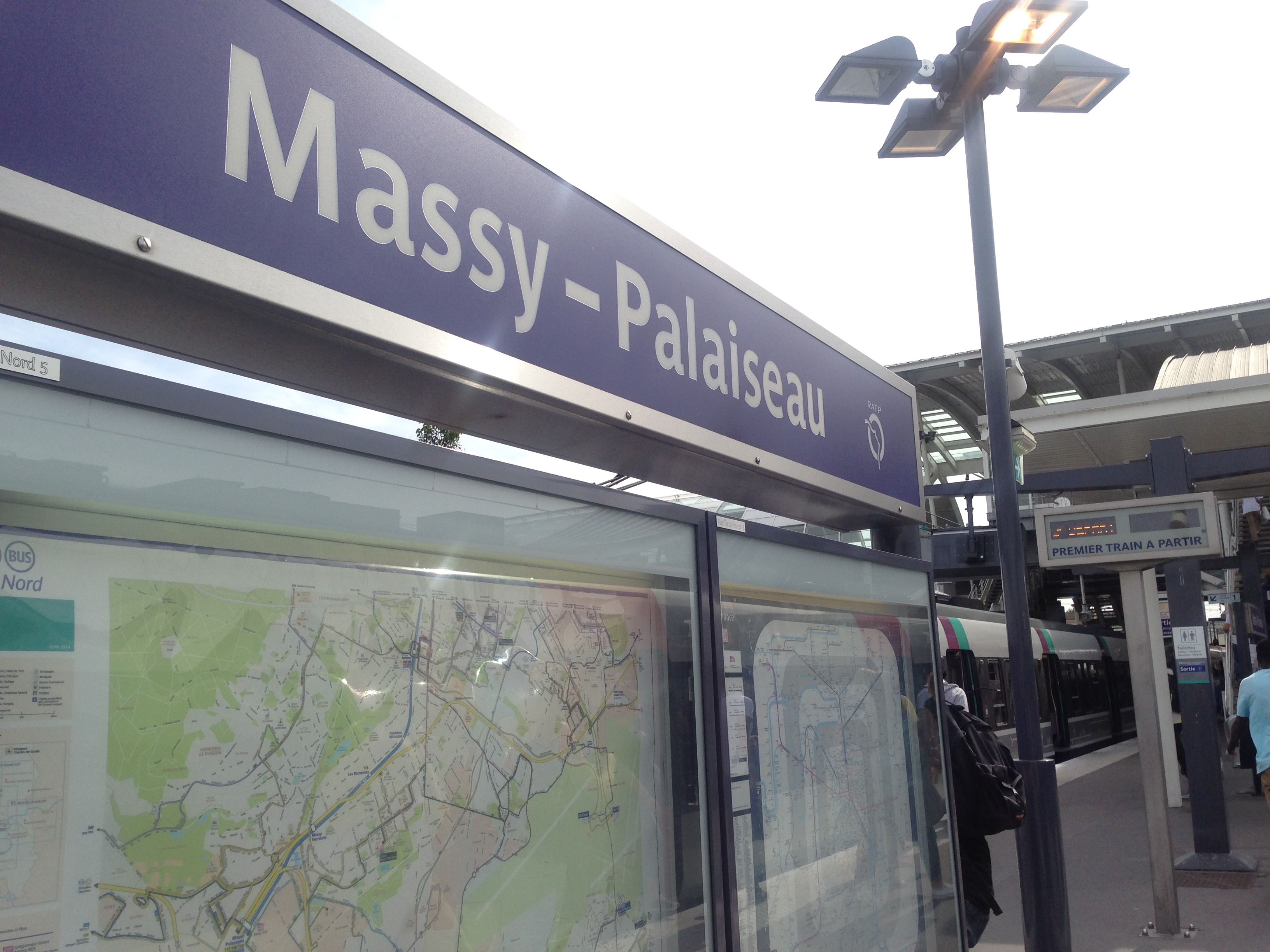 Gare de Massy-Palaiseau (sur le quai RER B)